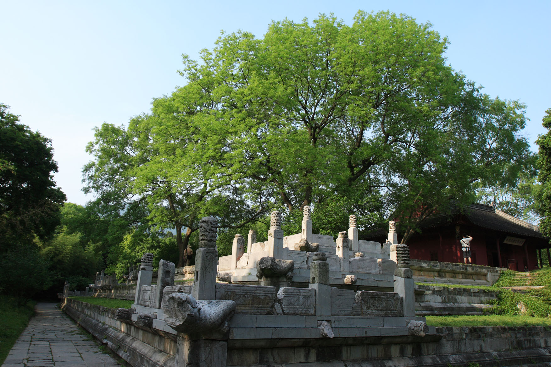 Ming Xiaoling Mausoleum; 明孝陵 at Nanjing